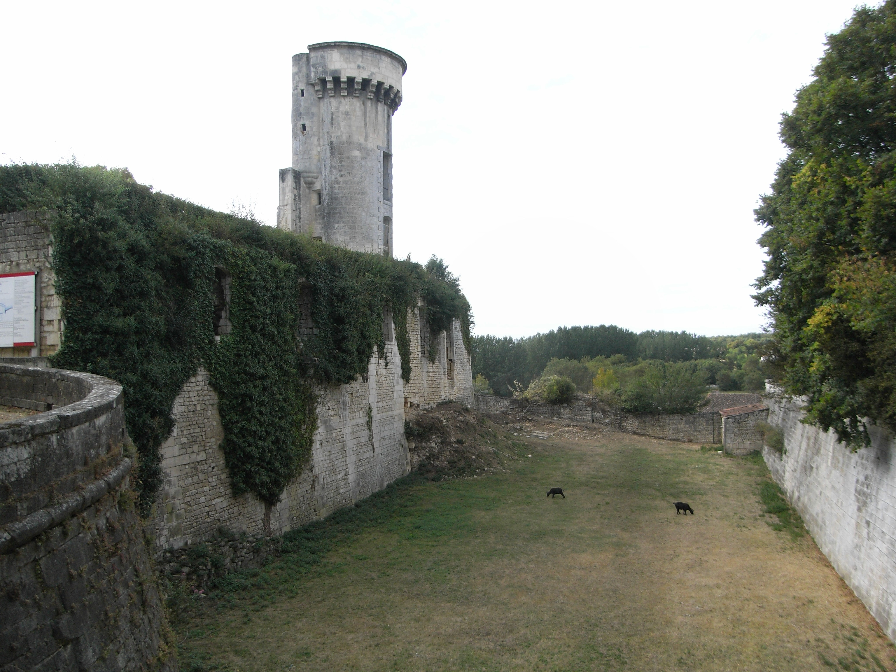 Château de Taillebourg en Charente-Maritime (France)